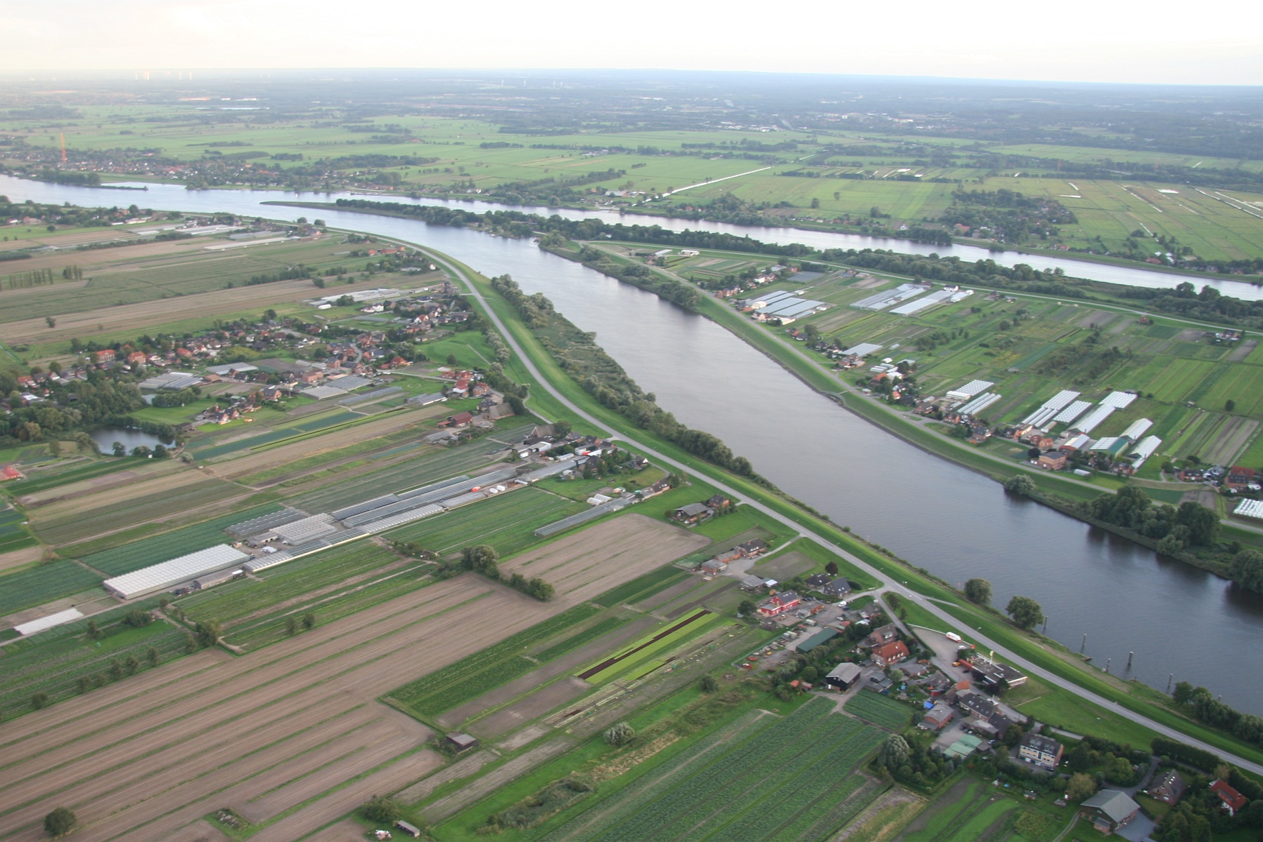 Bunthäuser Spitze, Vordergrund: Ochsenwerder / Spadenland